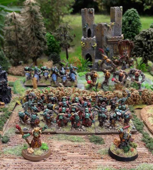 Figurines fantasy orc 15mm pour jouer à BannerWar